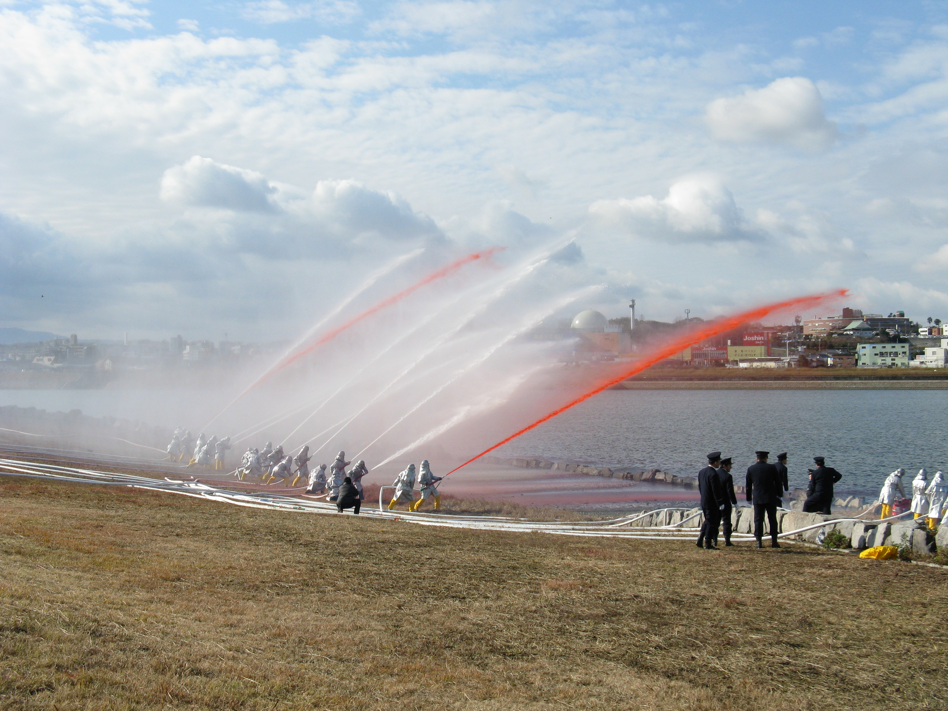 出初め式（大阪狭山市）